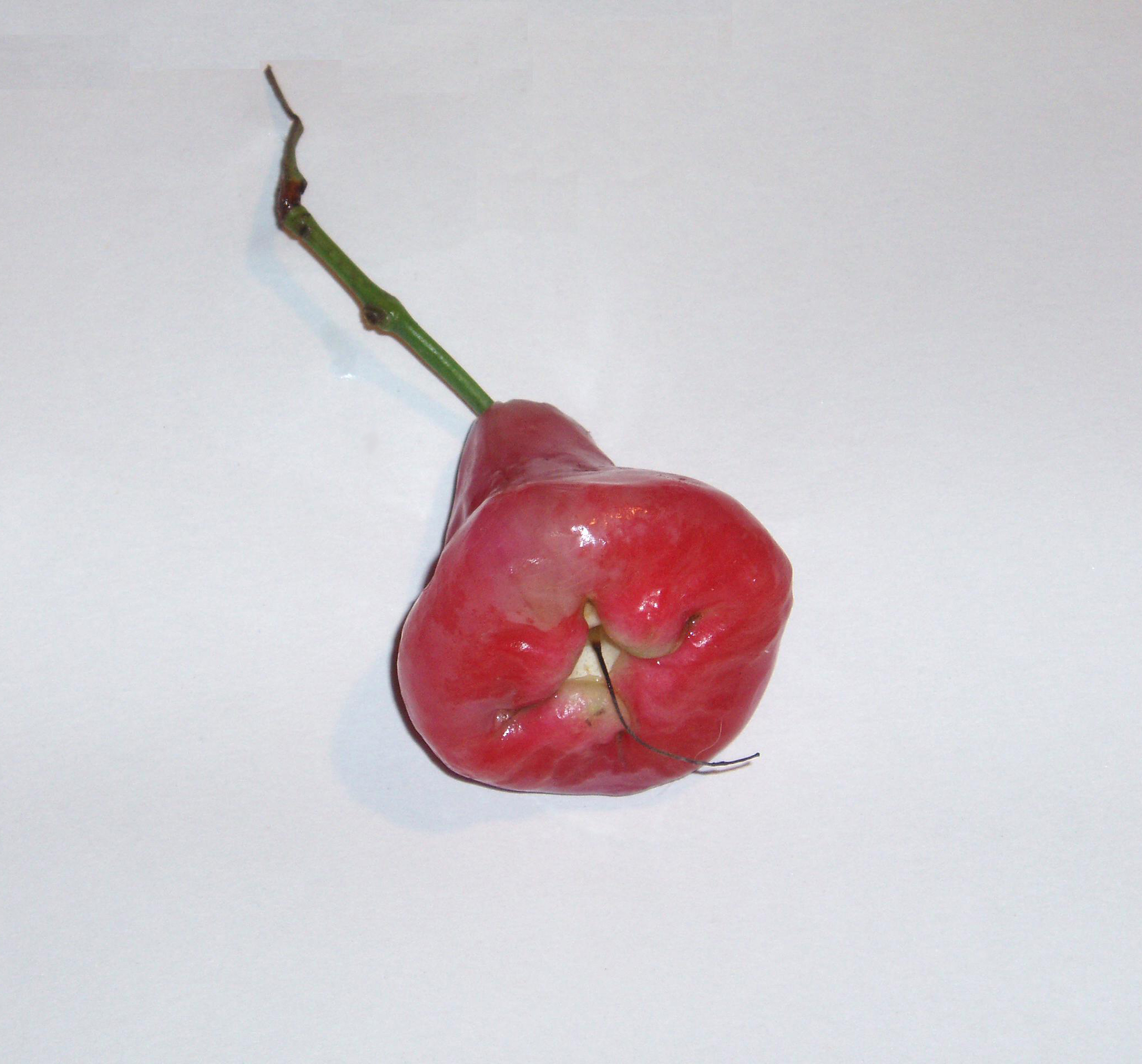 Wax apple